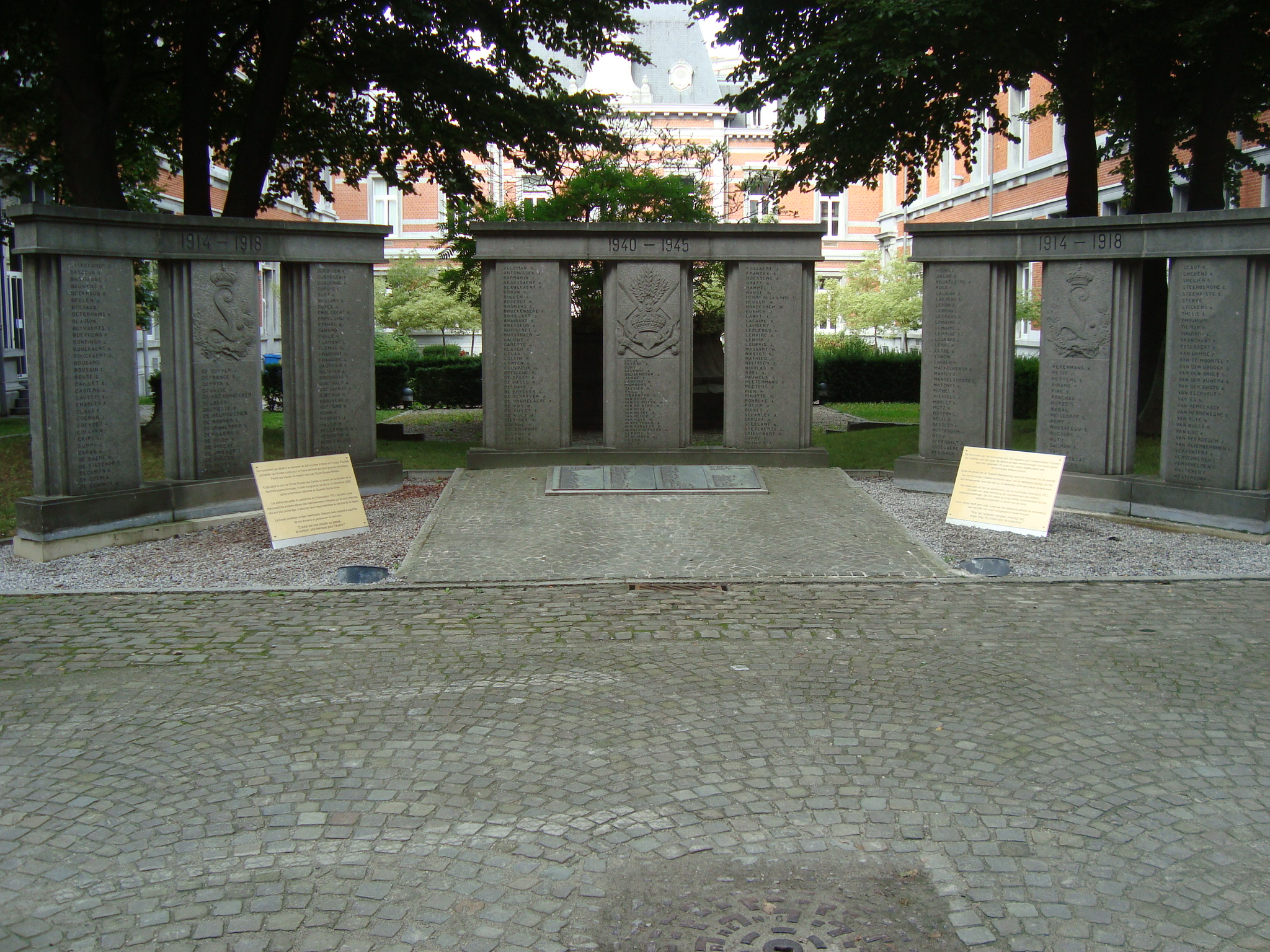 Drie maal drie pijlers met de namen van 340 gesneuvelden